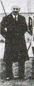 L'allenatore di calcio ungherese Jenő Károly alla Juventus nella stagione 1923-24.